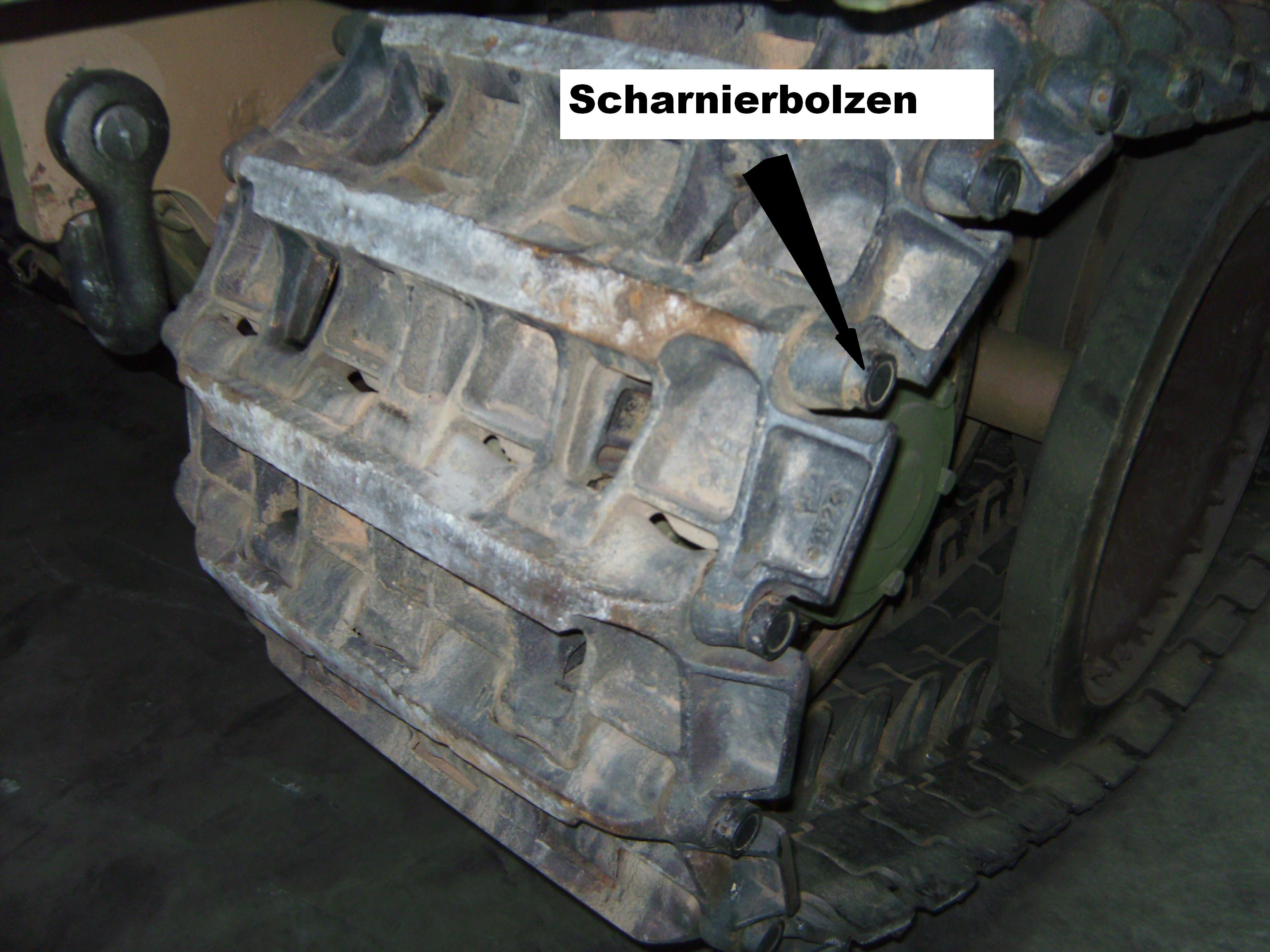 Scharnierkette eine Panther-Panzers in der Wehrtechnischen Studiensammlung in Koblenz